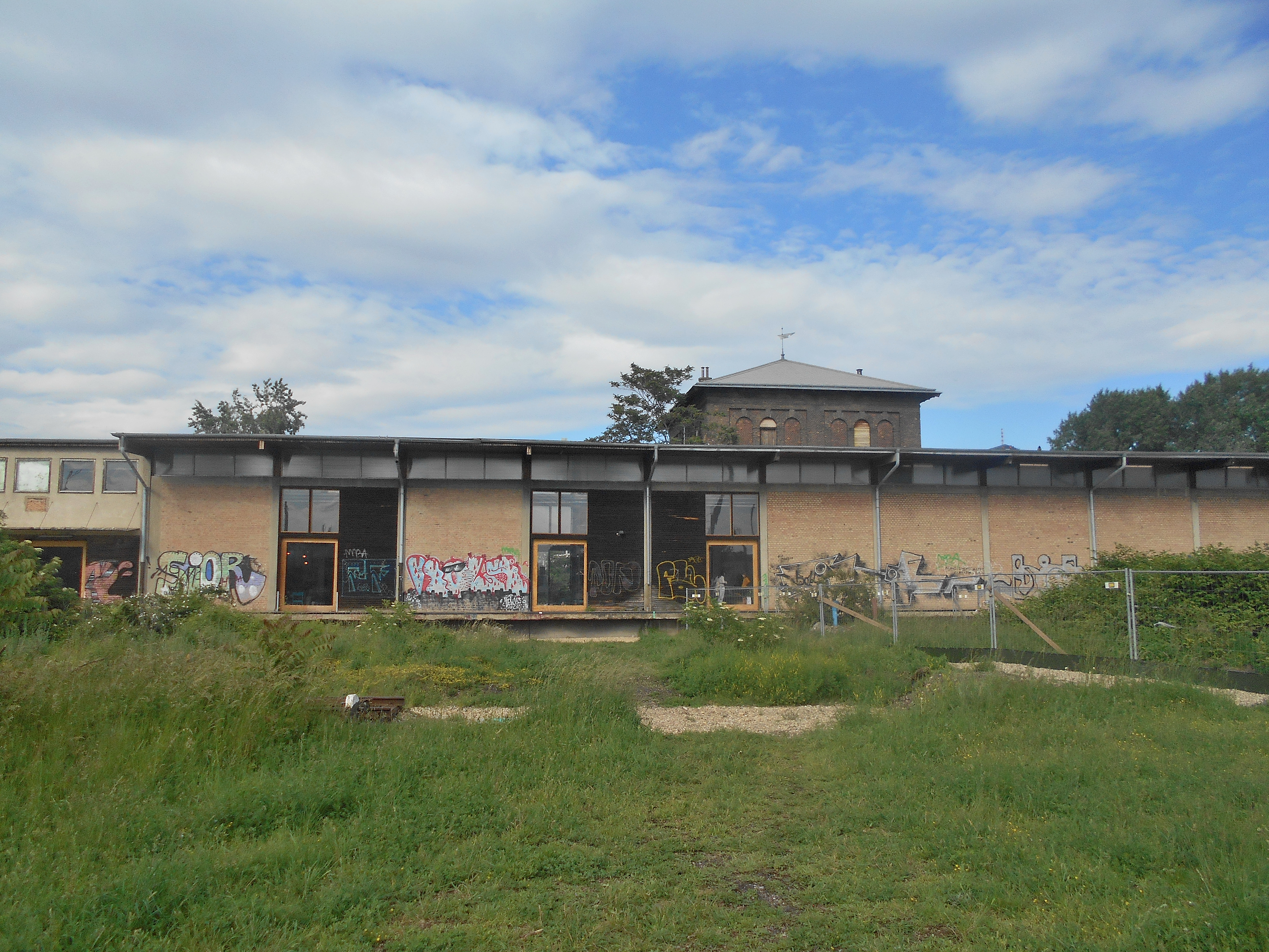 Nordbahnhalle